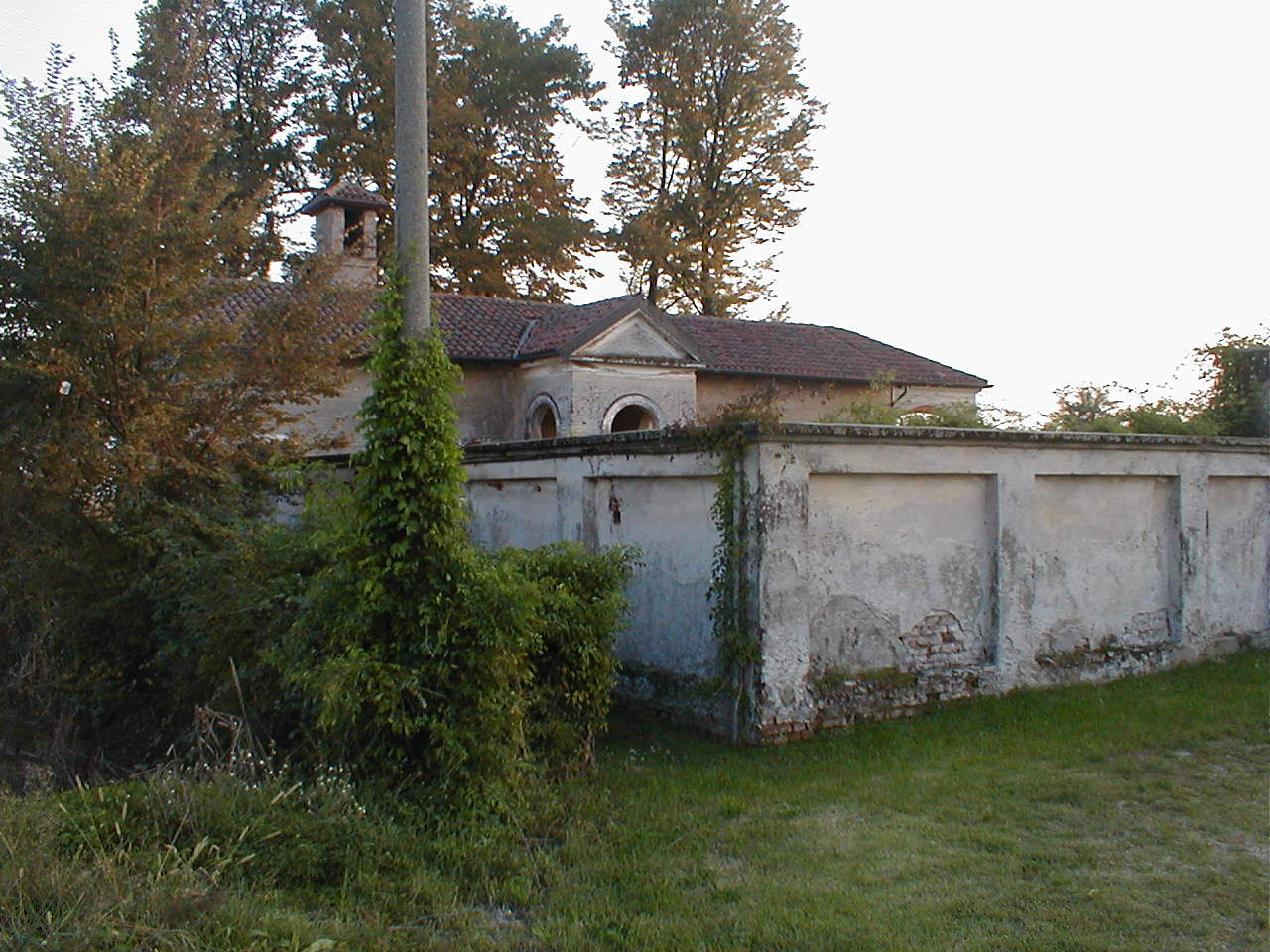 vista esterna prima dell'intervento di restauro